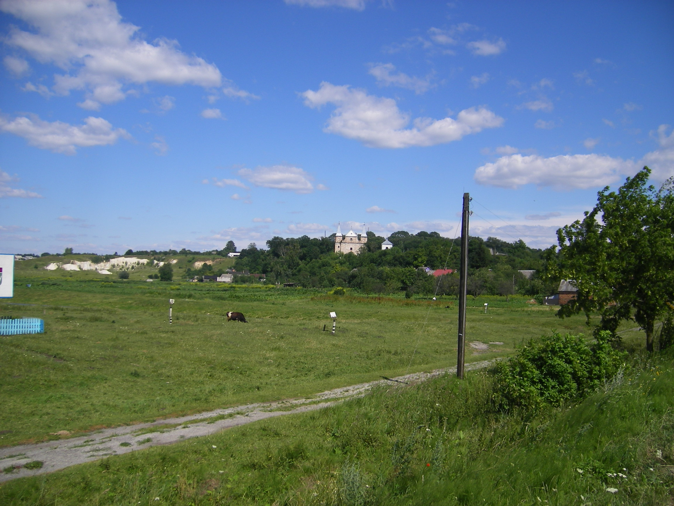 Klevan, Rivne Oblast